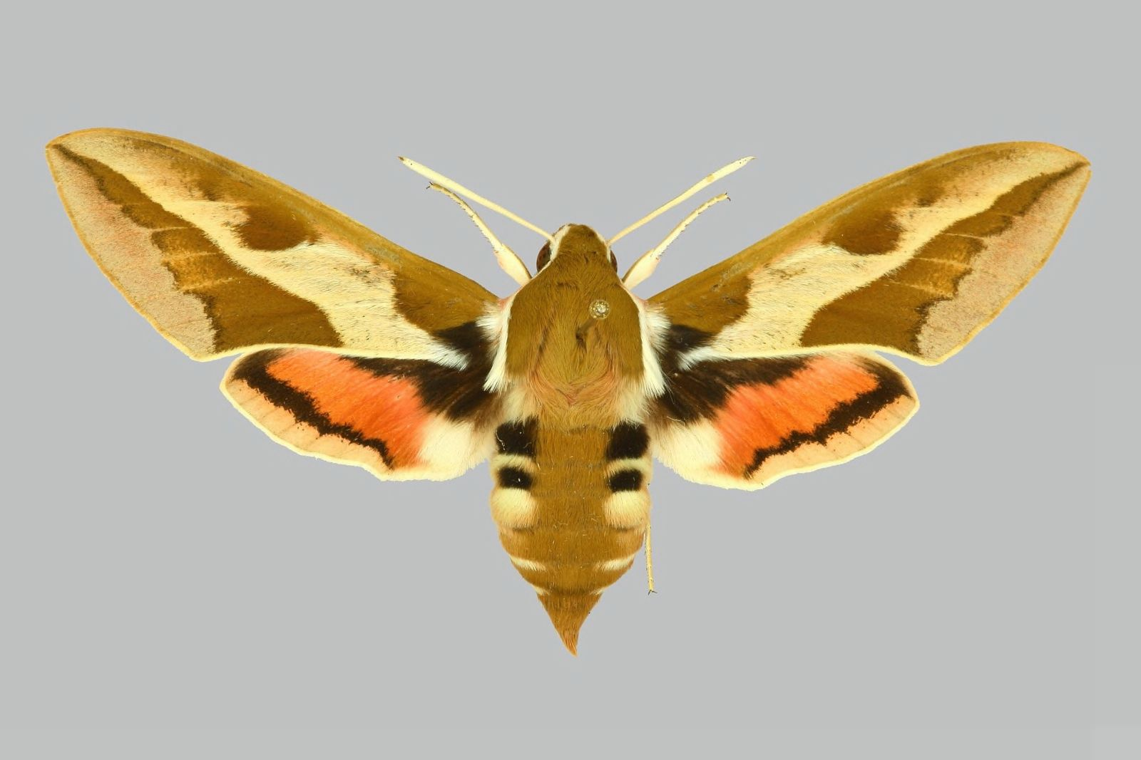 Hyles sammuti, female, upperside. Malta, Marfa